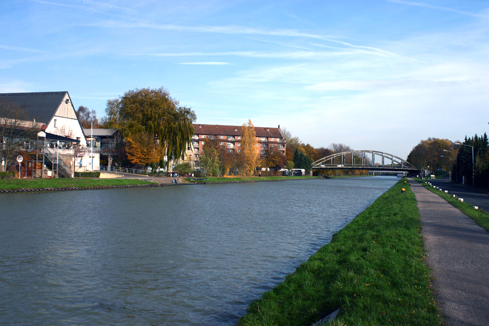 Der Dortmund-Ems-Kanal in Münster, Blick in Richtung Wolbecker Straßen Brücke